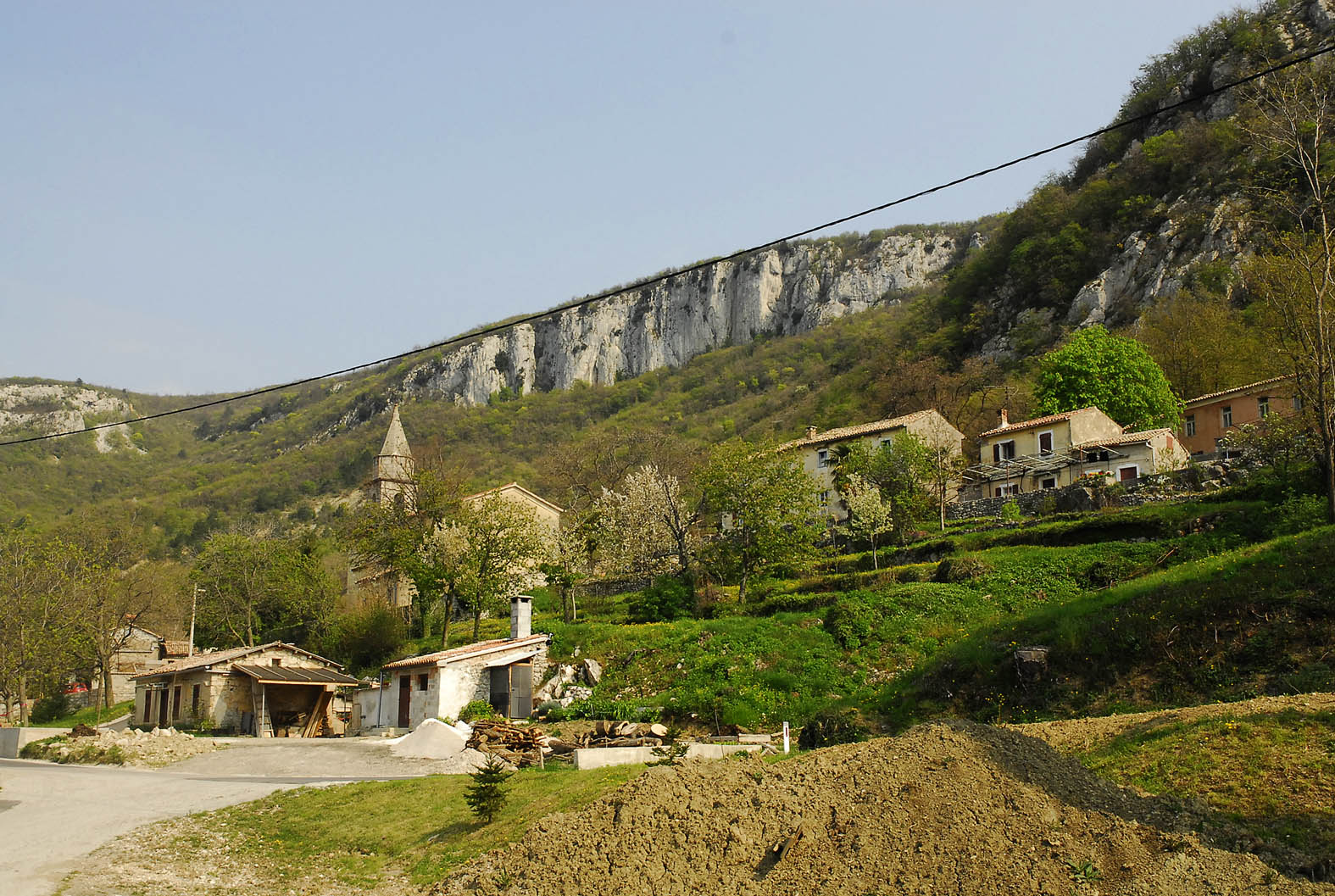 Dolenja Vas